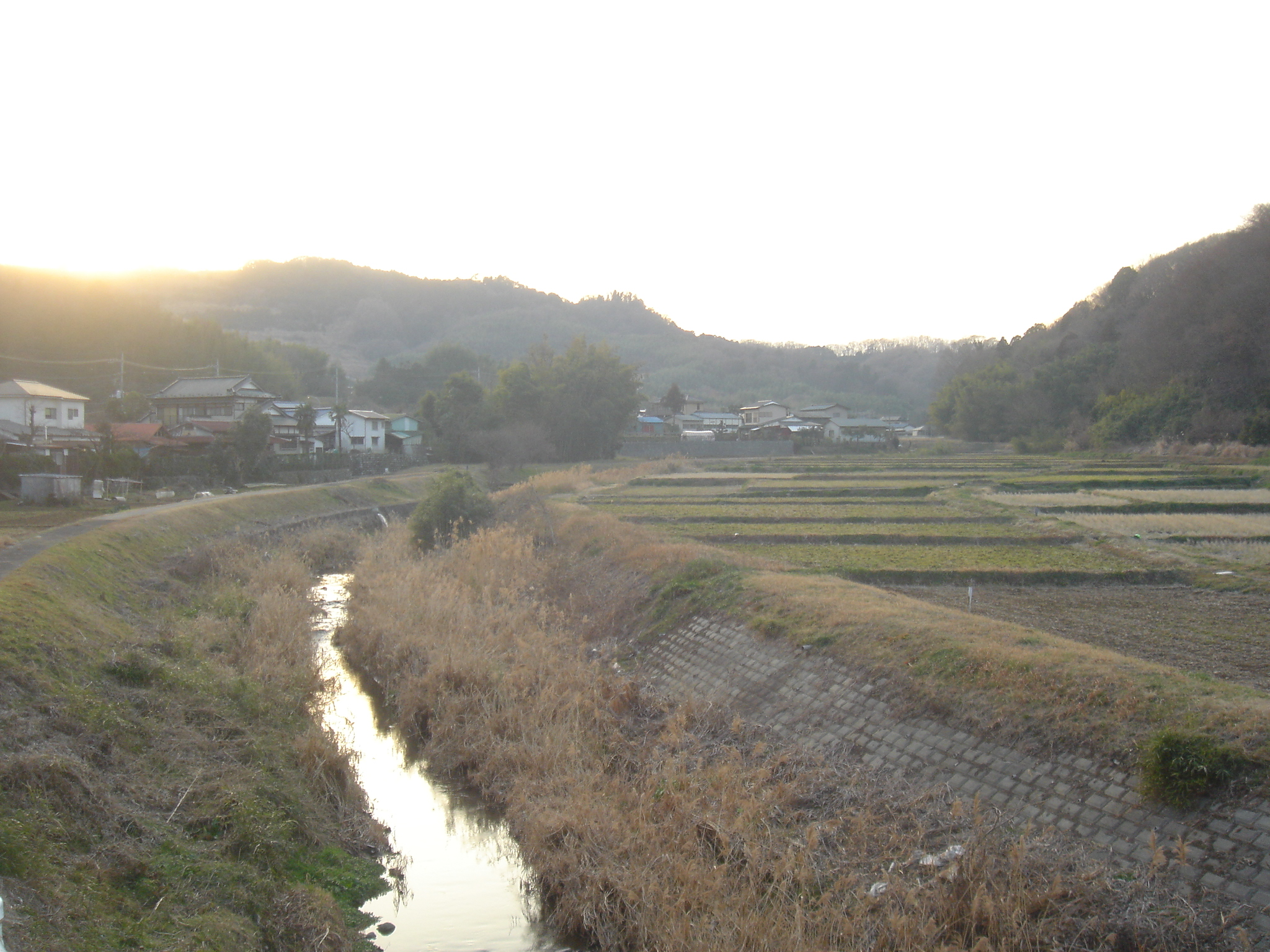 Nakamuragawa, Nakai town